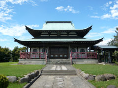 黄檗宗西願寺本堂